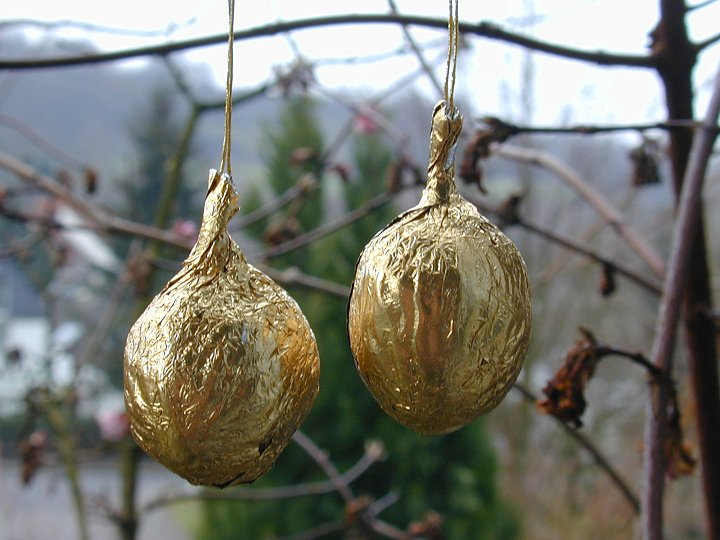 mit Goldfolie überzogene Schokoladenwalnüsse als Weihnachtsschmuck